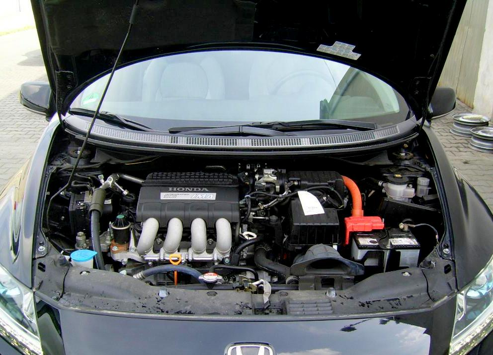 Silnik Hondy CR-Z